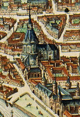 Extrait de la carte de Johan Blaeu Saint Croix et Saint Michel